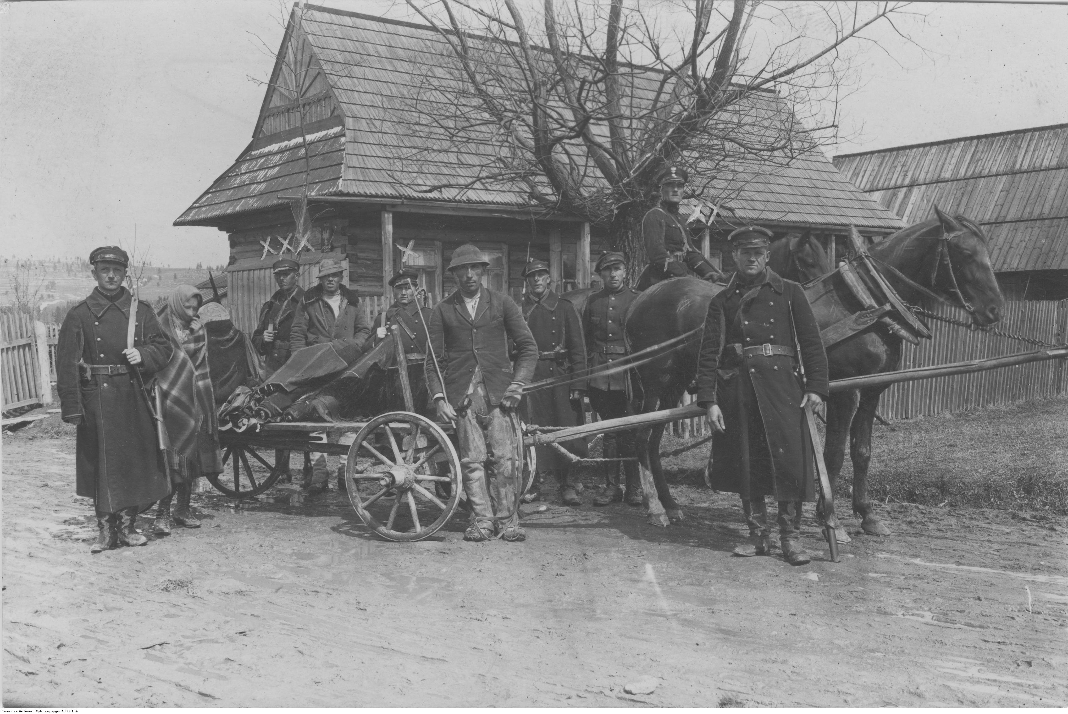 Straż Graniczna ze schwytanymi przemytnikami w Chochołowie. Koncern Ilustrowany Kurier Codzienny - Archiwum Ilustracji. Sygnatura: 1-G-6454